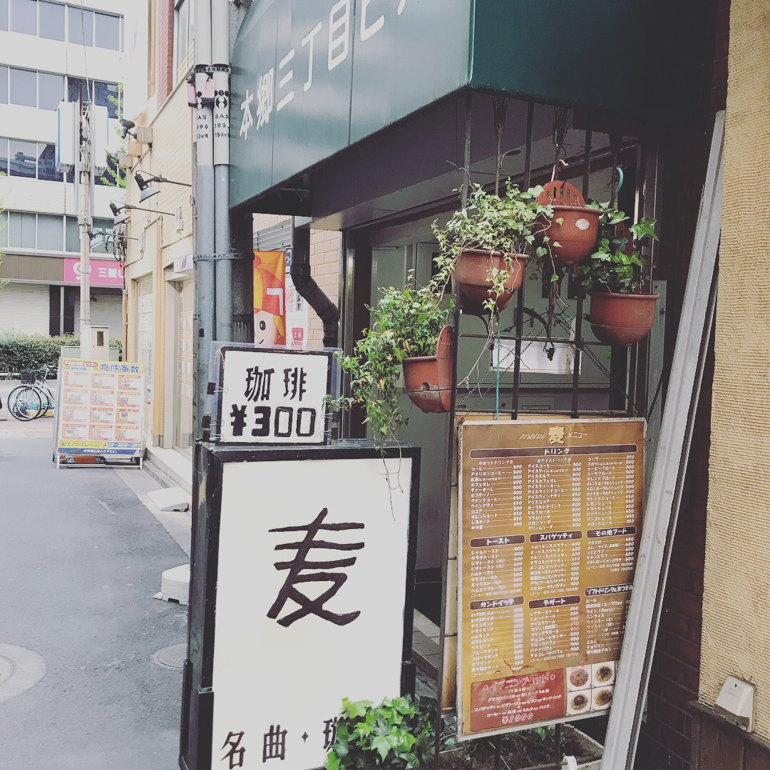 東京都文京区本郷の名曲喫茶